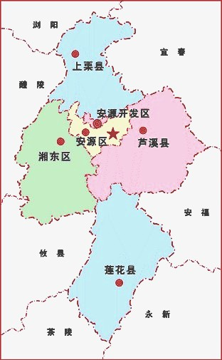 此图为tiangong83制作